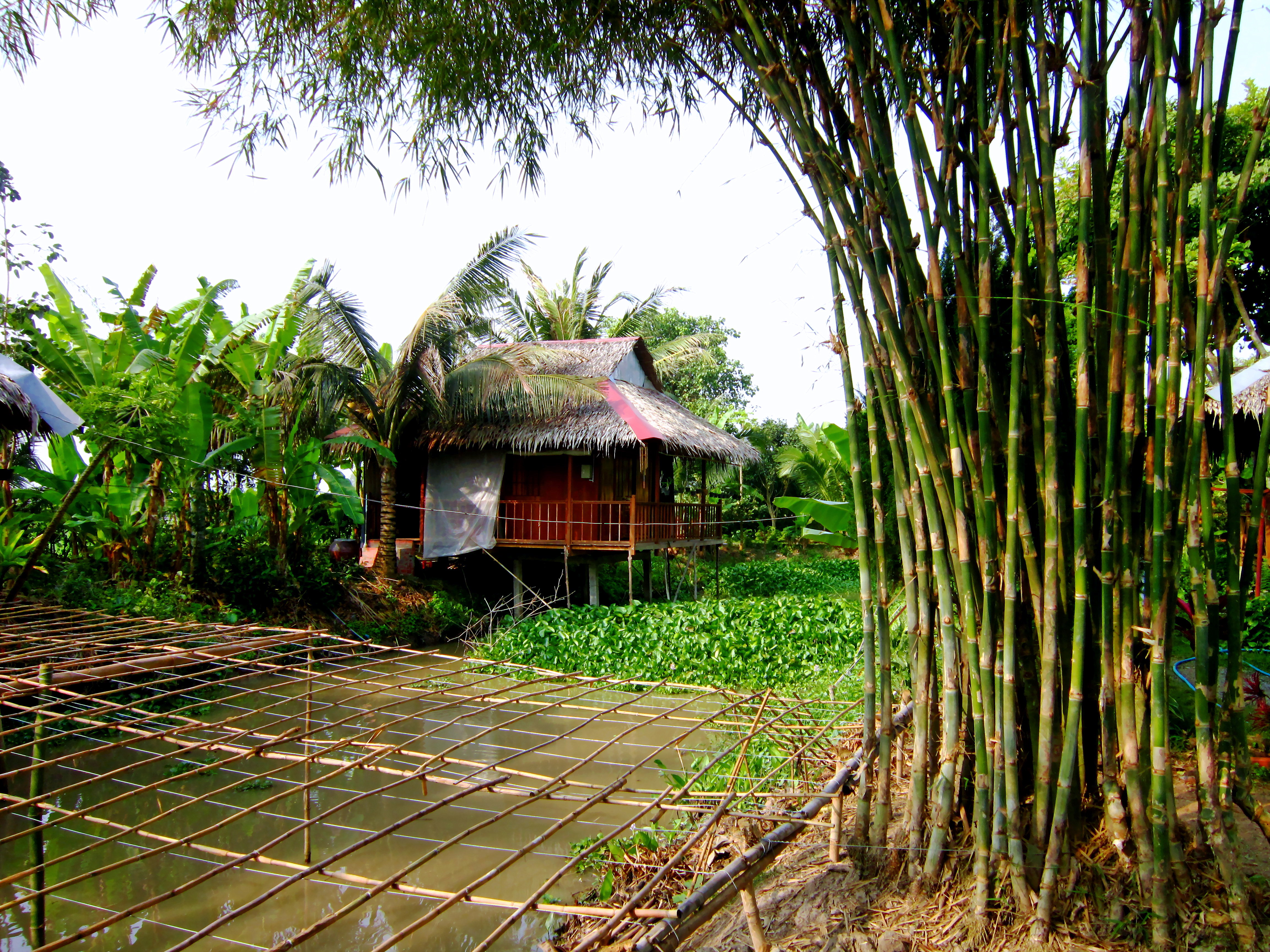 Một bụi tầm vông (Thyrsostachys siamensis) ở miền Nam Việt Nam.